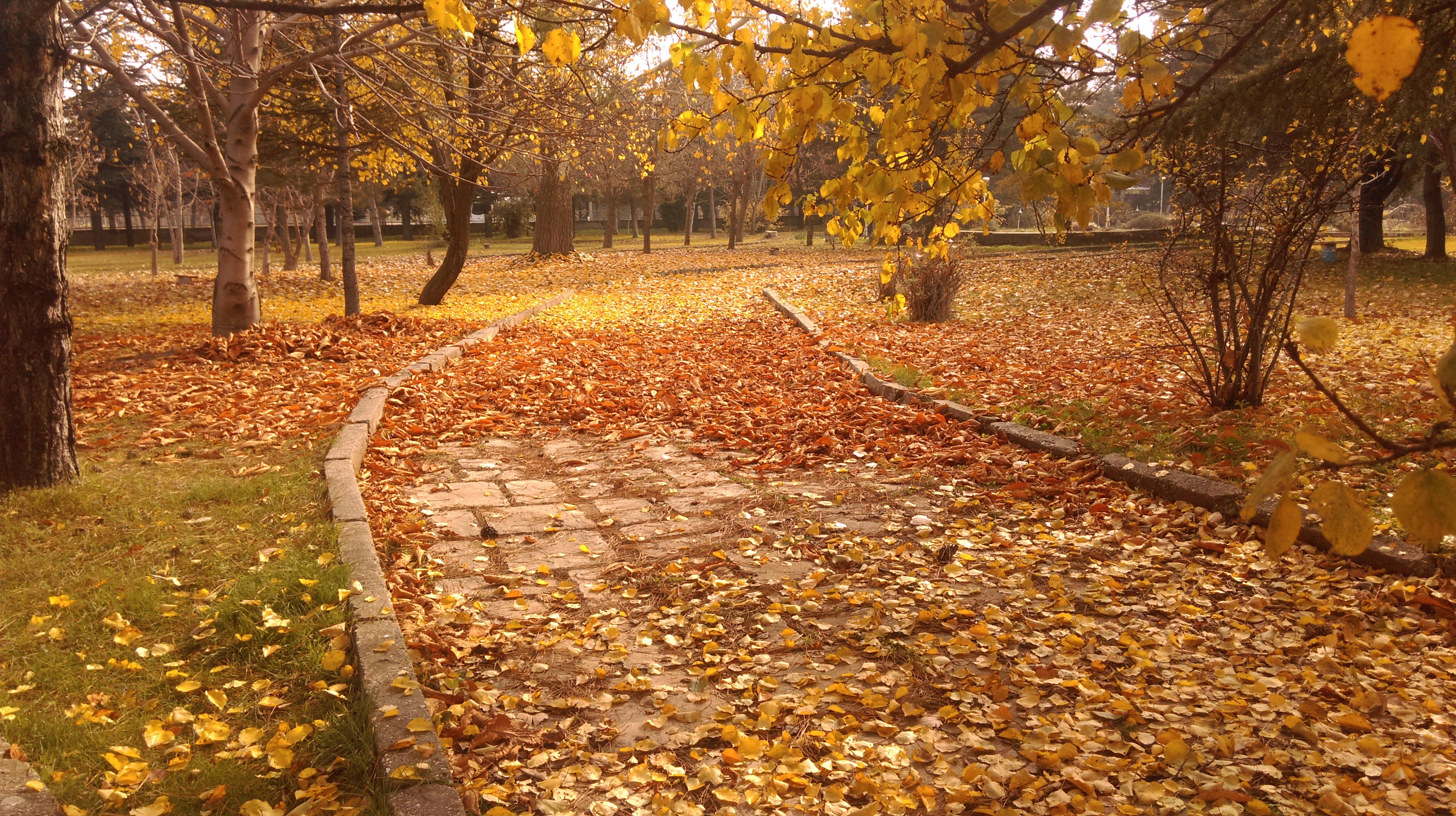 Sonbahar.